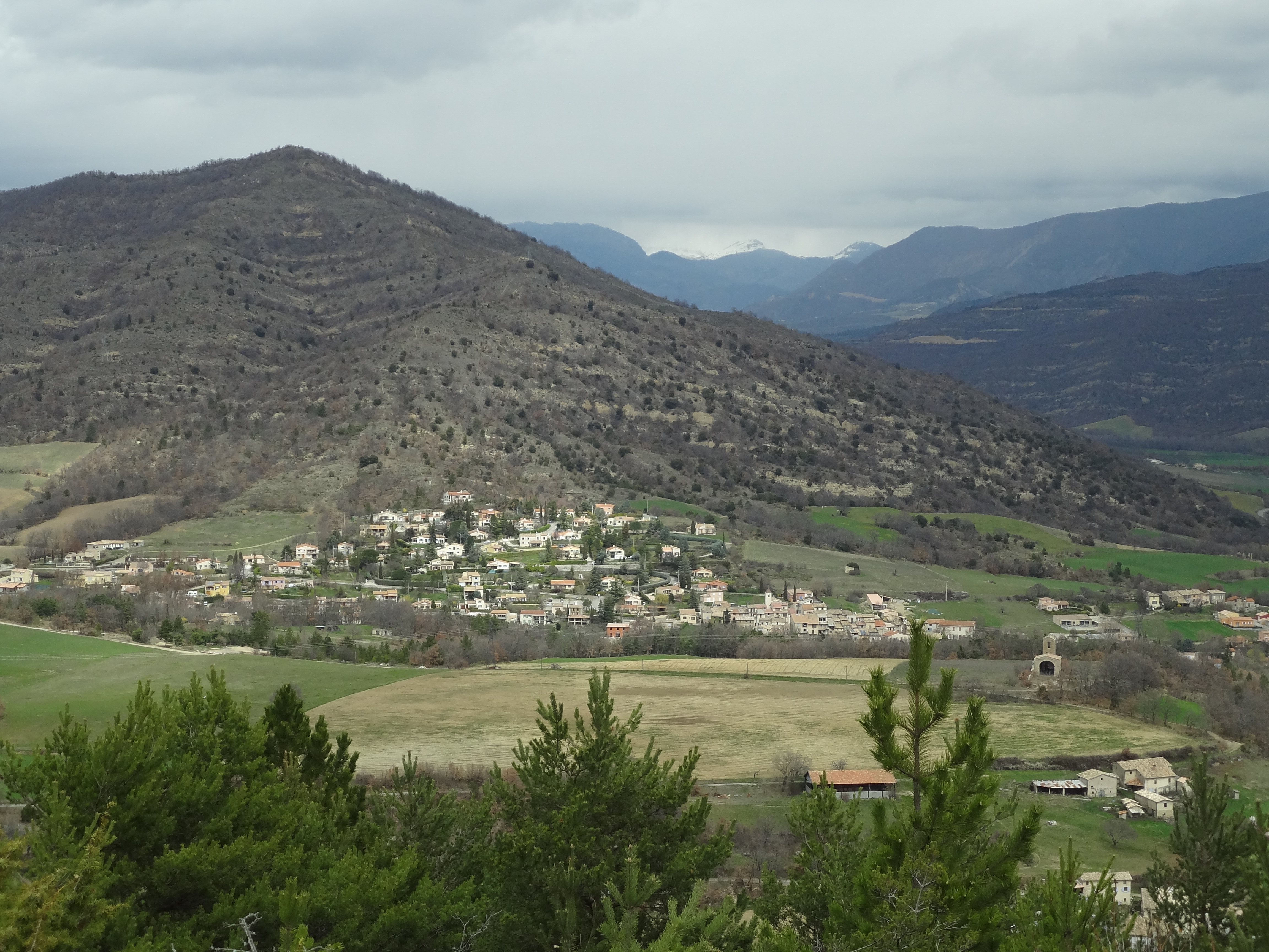 Vue de Mirabeau, au pied du Piégu (1010 m), photo prise de la colline Saint-Philippe